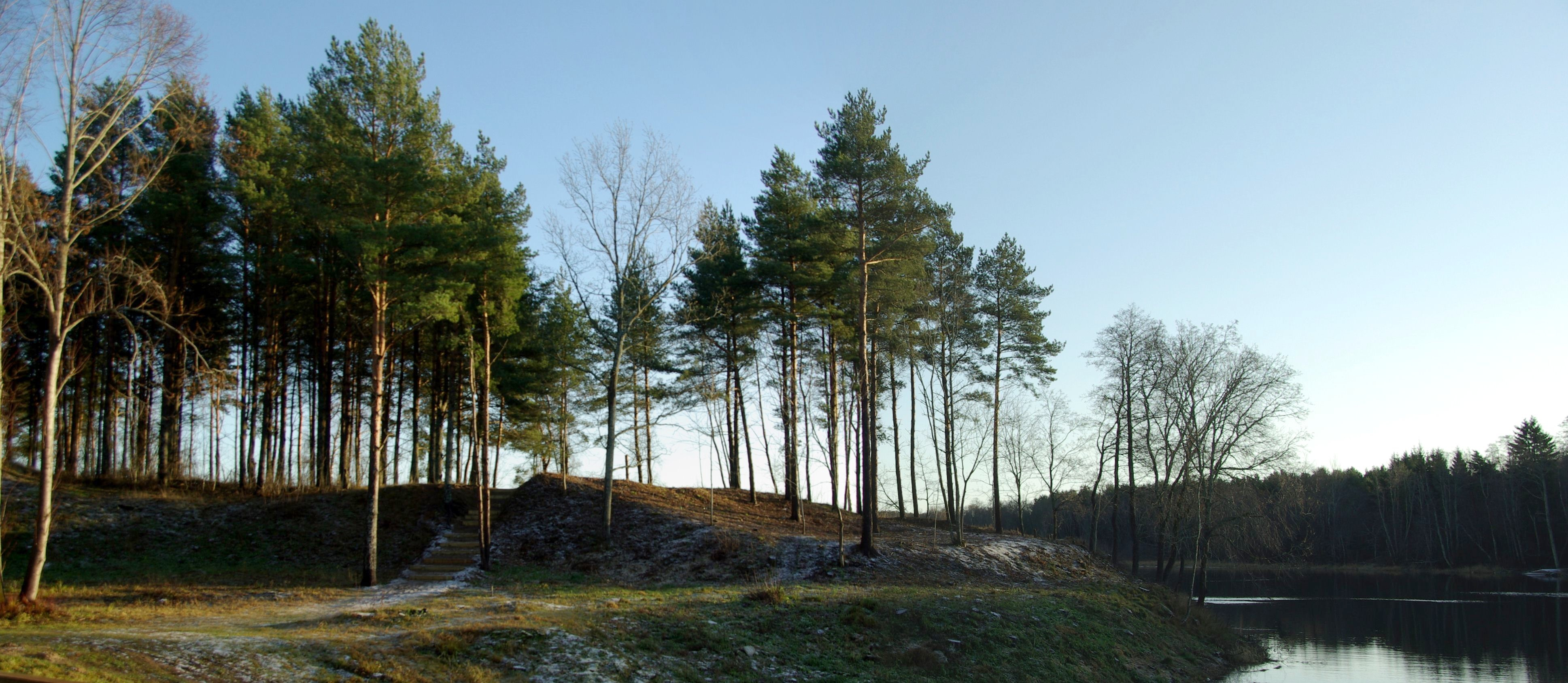 Jägala Jõesuu linnamägi